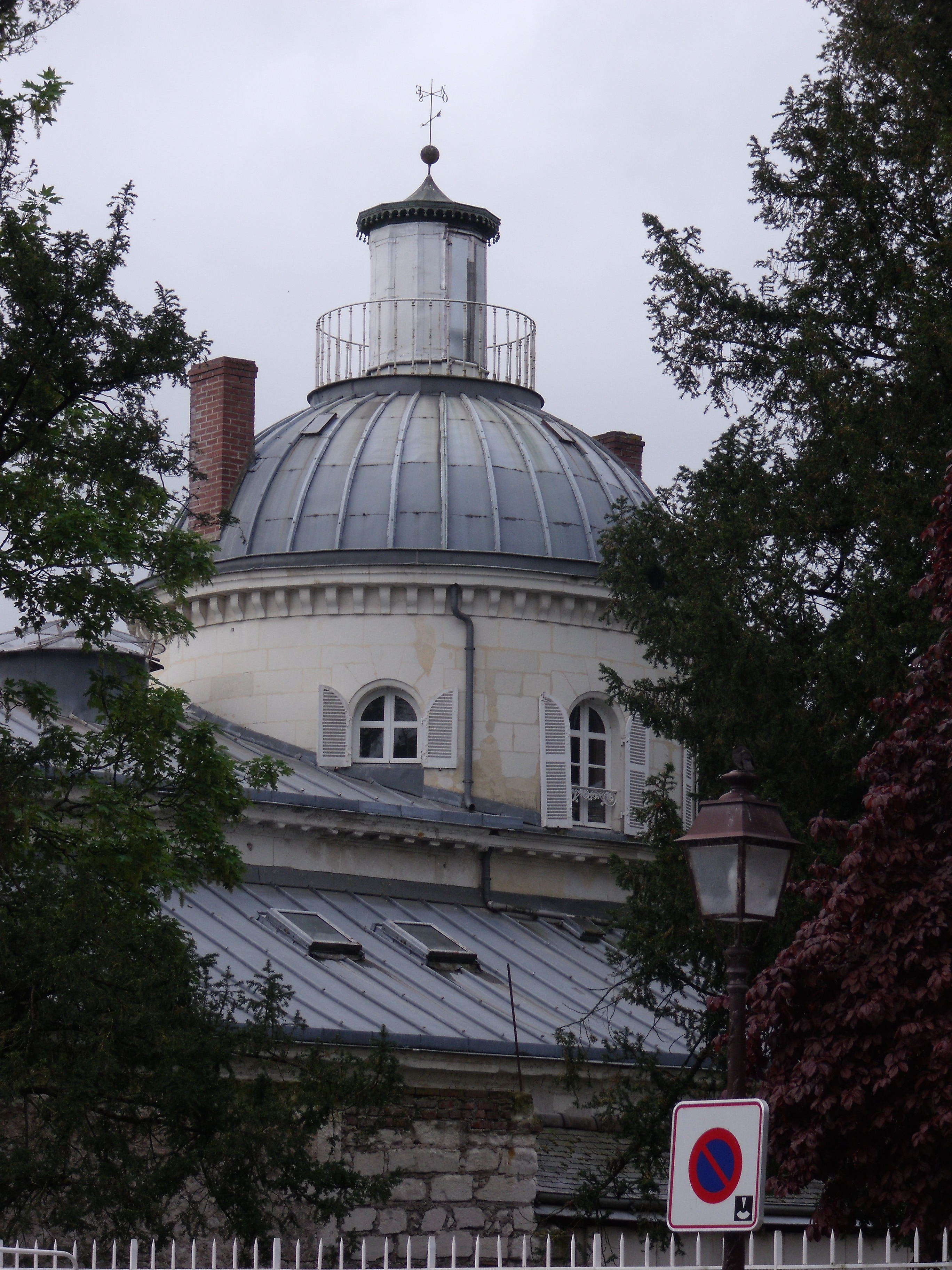 Une copie du chateau de Bagatelle réalisée pour Henry Marcel